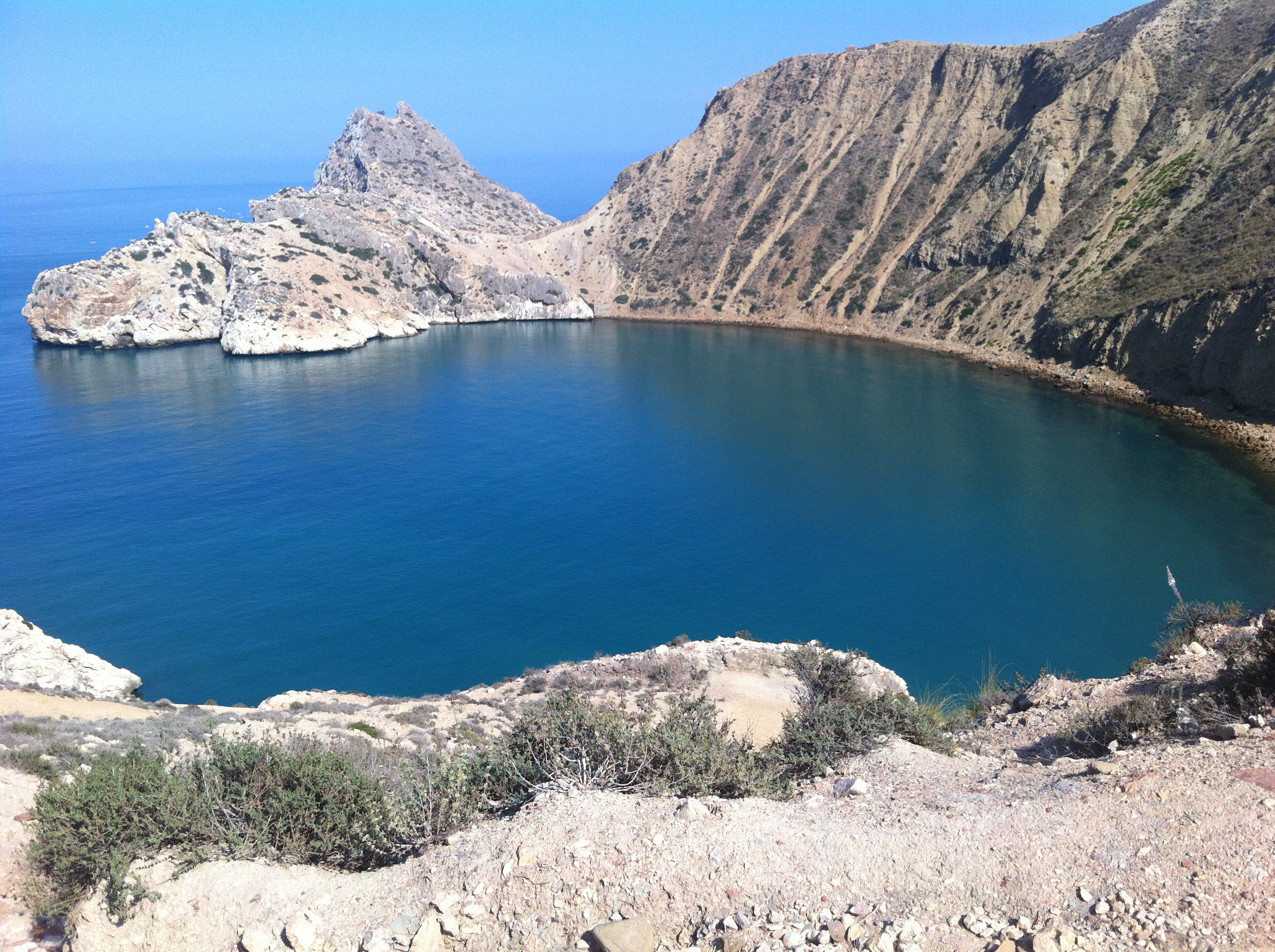 Vue sur la plage Mers Dar à El Jebha.